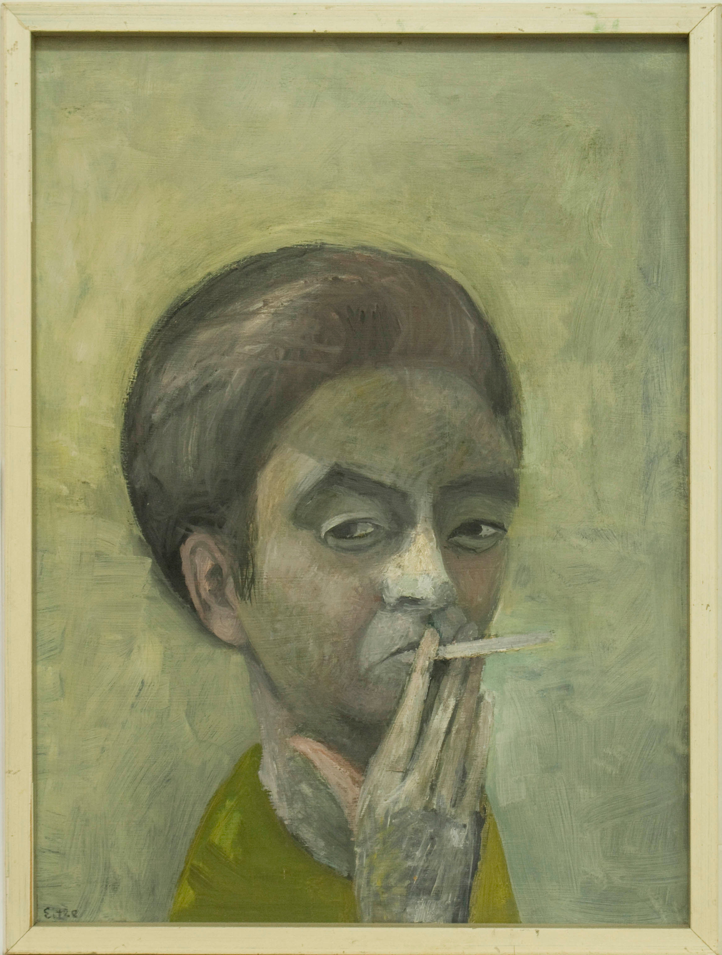 Selbstbildnis der Tübinger Malerin Ruth Eitle ca.1954